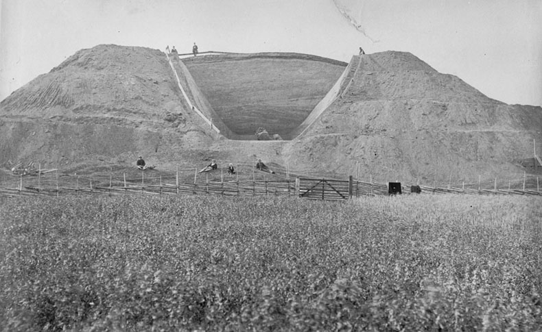 RAÄ-nr: Uppsala 123:1. Schakt från utgrävningen av Västhögen 1874. Motiv: Gamla Uppsala Nyckelord: Raä-Fastigheter, Riksintressen Kategori: Hög RAÄ-nr: Uppsala 123:1. Schakt från utgrävningen av Västhögen 1874.